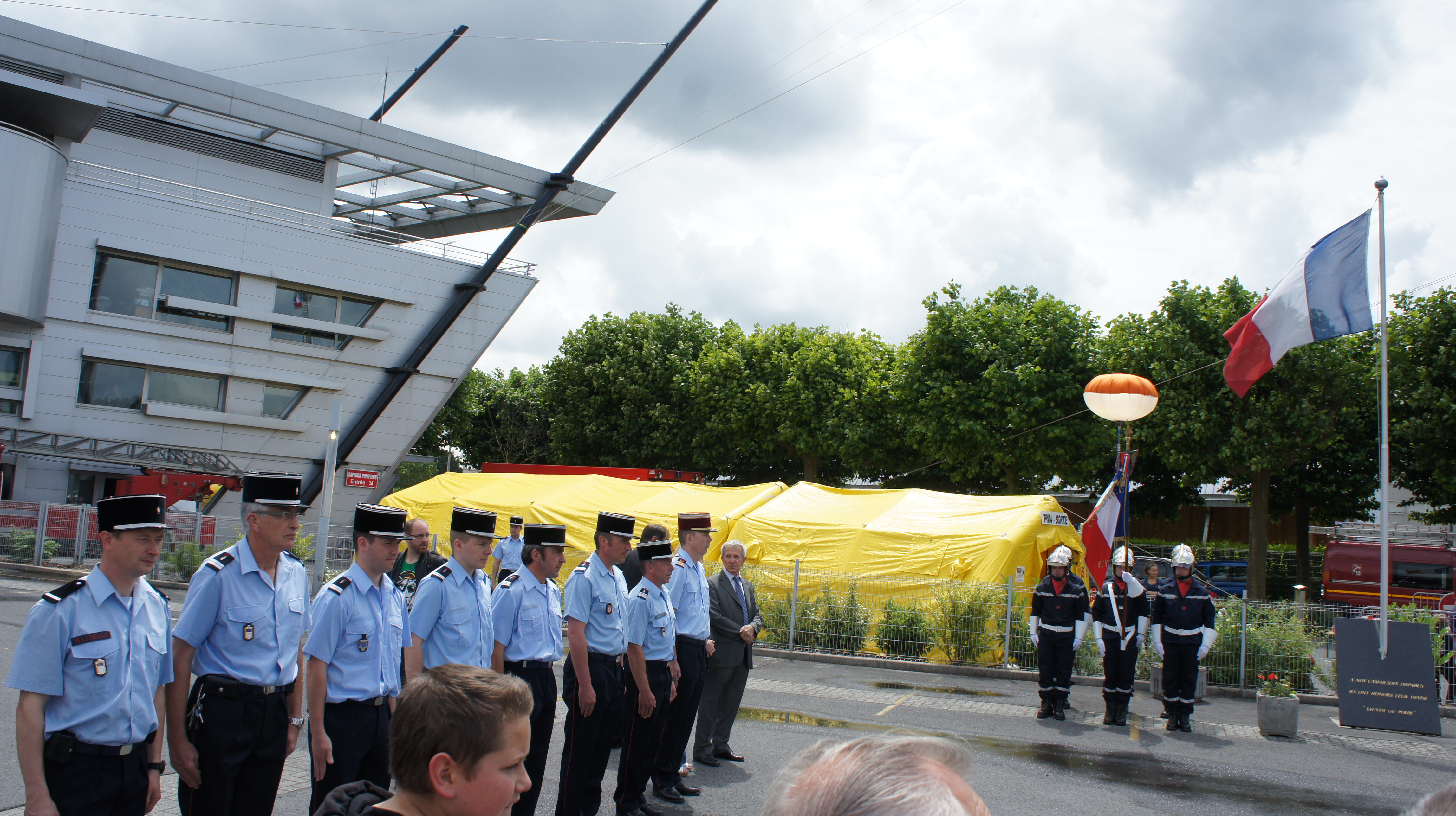 lors des journées portes ouvertes 2013.